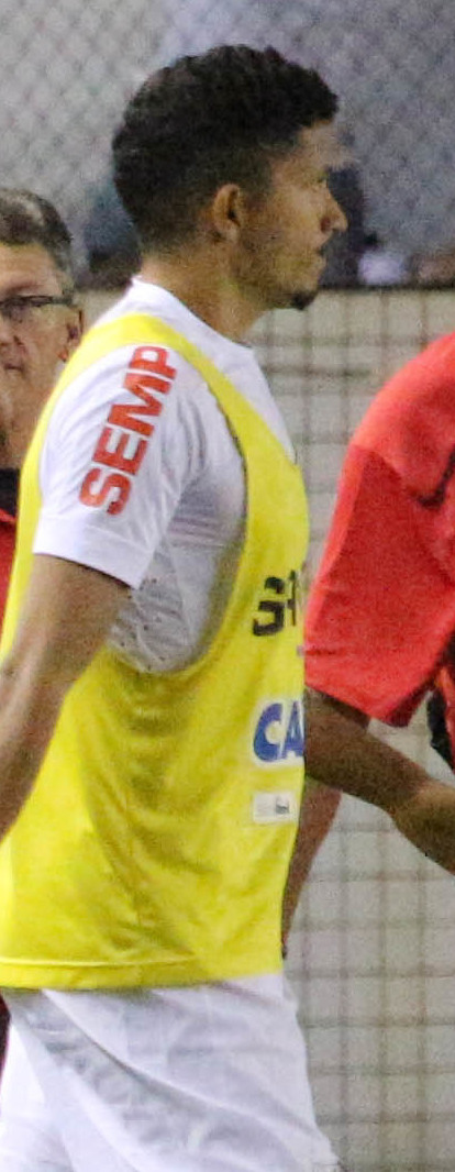 Foto: Douglas Teixeira/futebolsantista.com.br